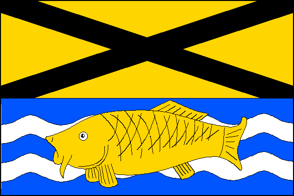 vlajka, Lhotka, okres Žďár nad Sázavou